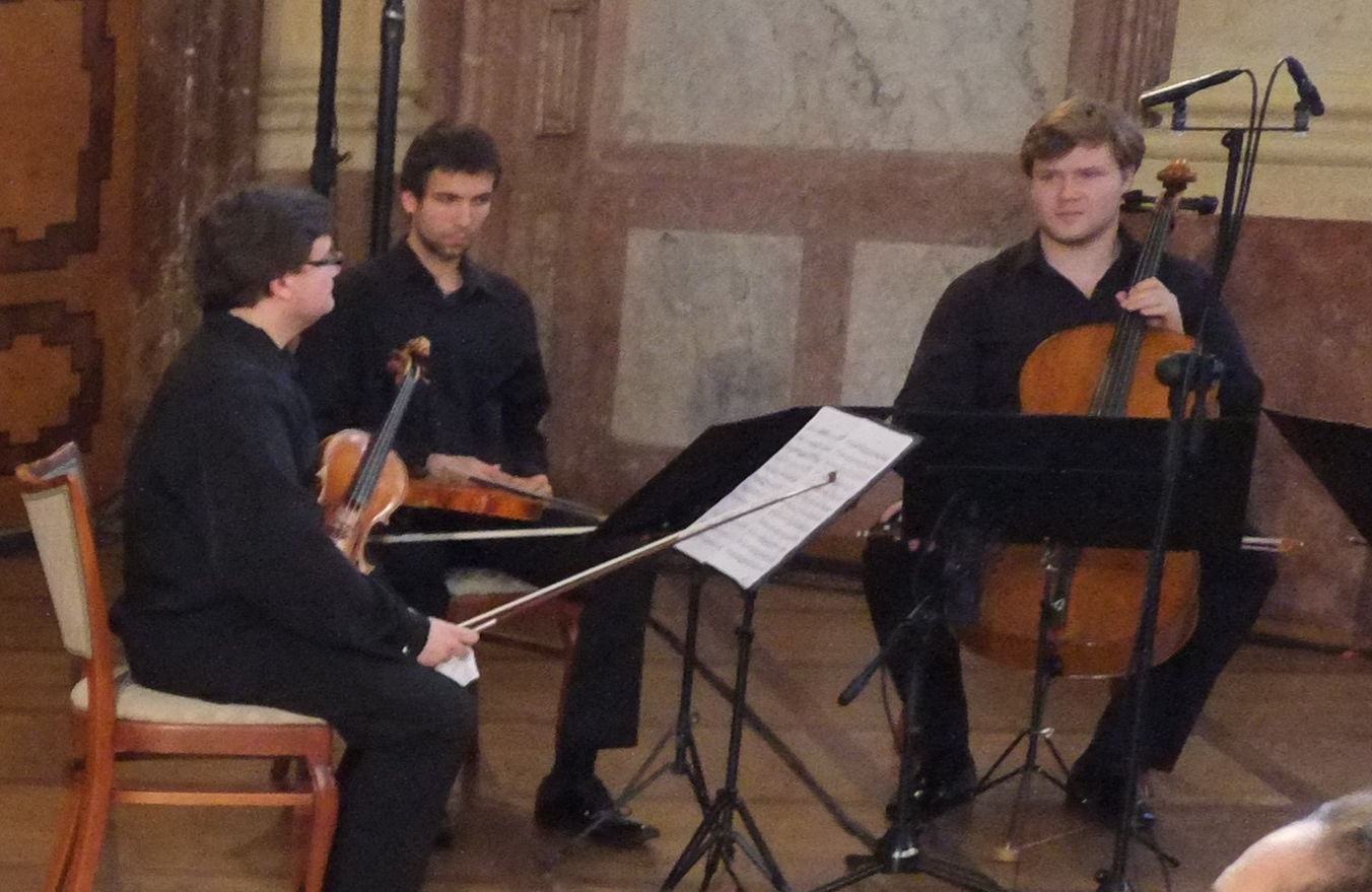 Doležalovo kvarteto při slavnostním předávání stříbrných medailí v Senátu v roce 2016.